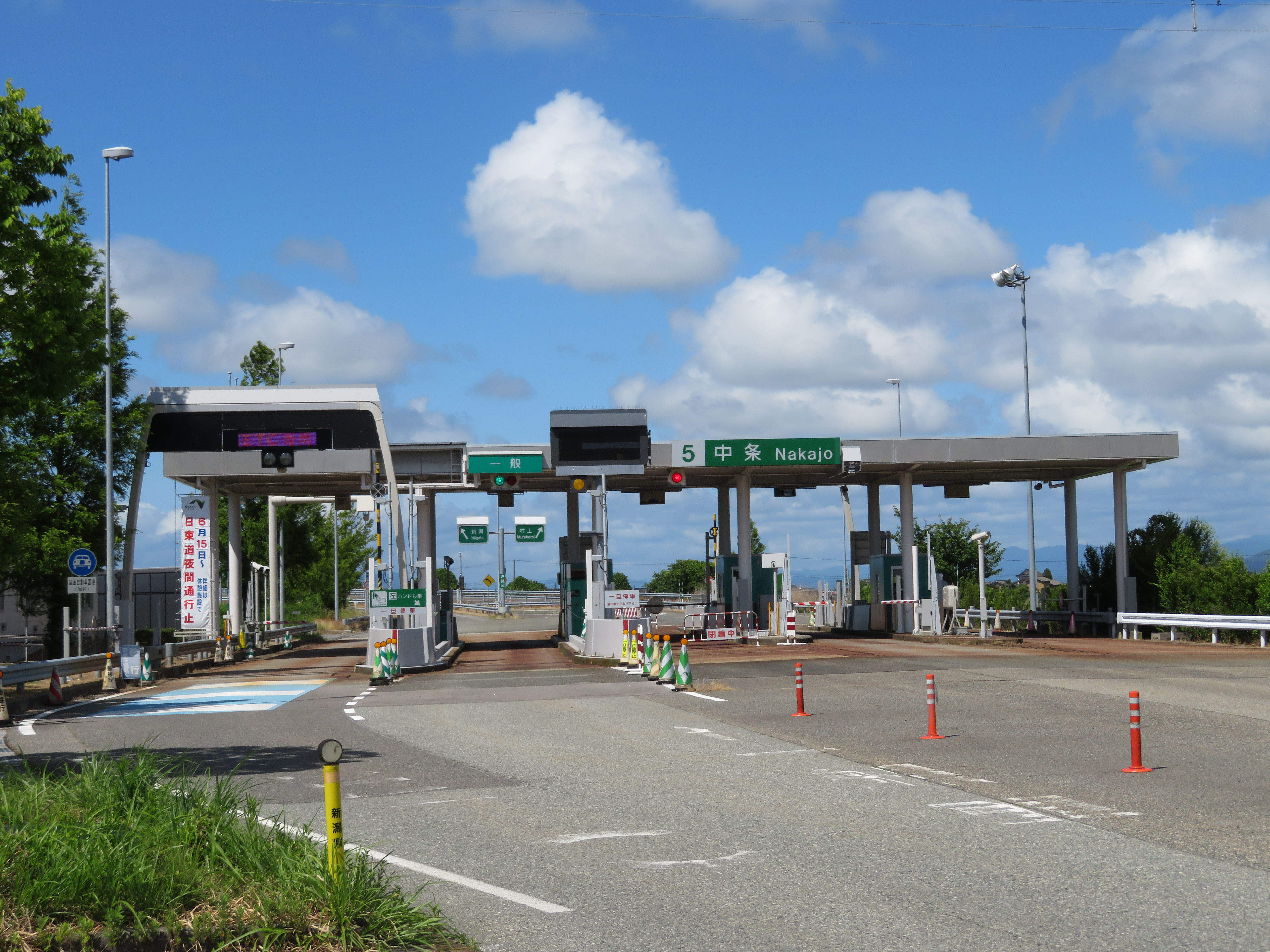 日本海東北自動車道中条ＩＣ料金所（一般道側から撮影） Canon PowerShot SX720 HS